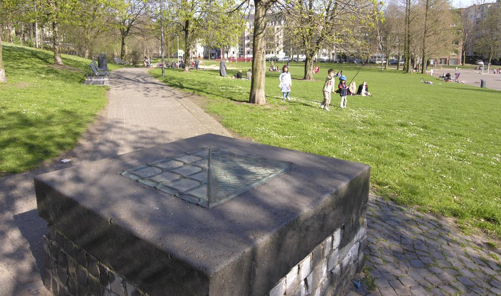 Köln, Klingelpütz (Gedenkstein für die während des Nationalsozialismus hingerichteten). Bildhauer: Hans Karl Burgeff.